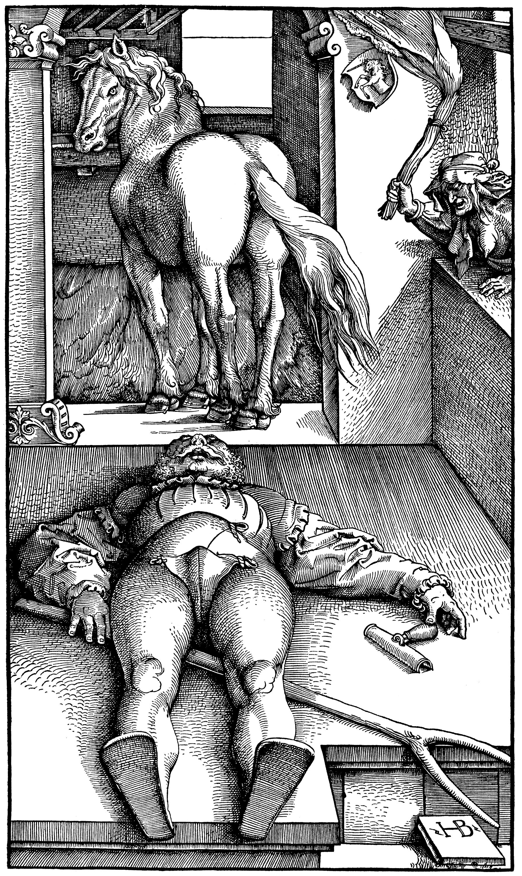 Liegender Stallknecht vor Pferd mit Hexe im Fenster